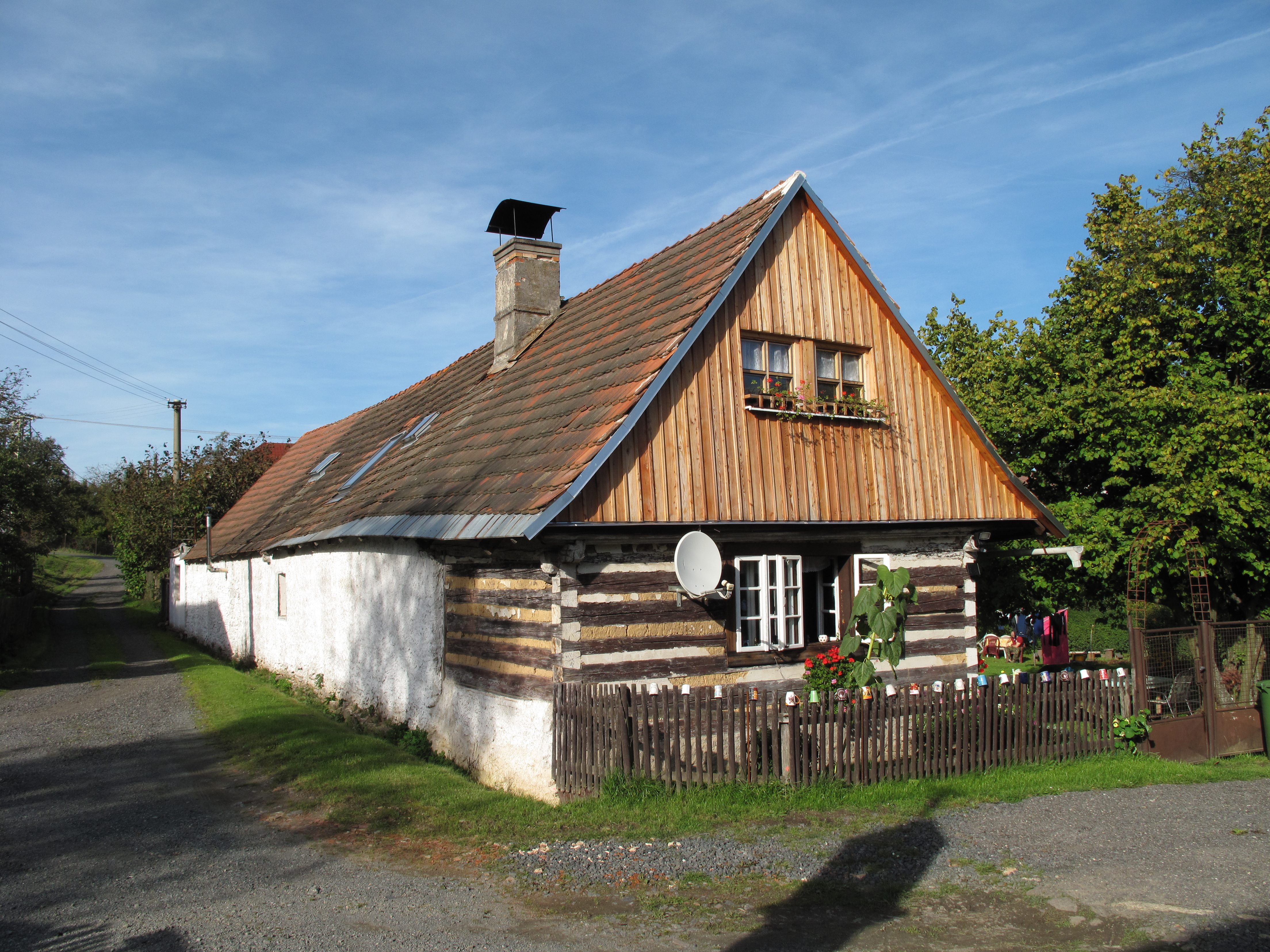 Profil roubenky v Uhlířských Janovicích. Okres Kutná Hora, Česká republika.